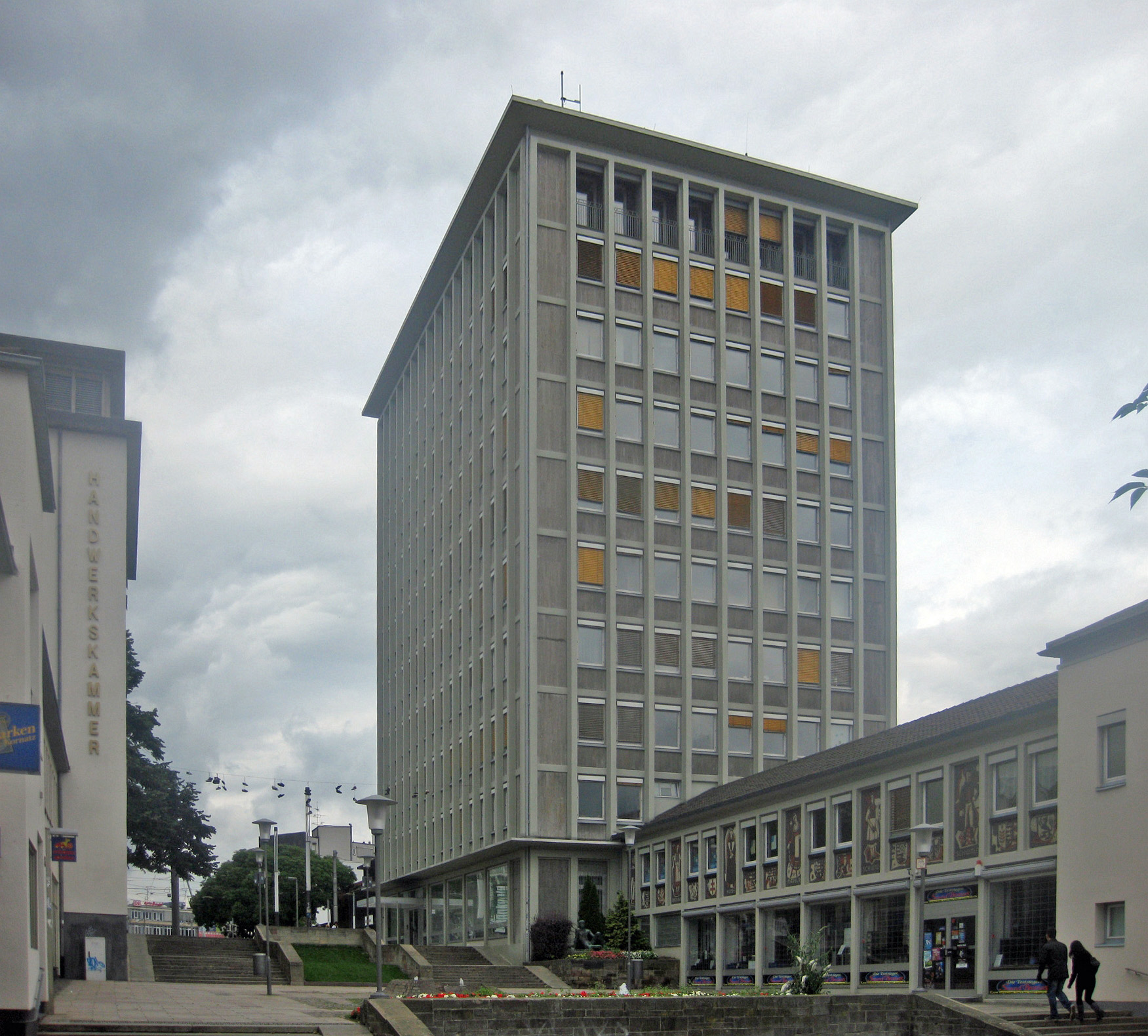 Die Treppenstraße in Kassel ist die erste geplante und ausgeführte Fußgängerzone Deutschlands, im Hintergrund das EAM-Hochhaus (Architekt: Werner Seidel, 1954-56)